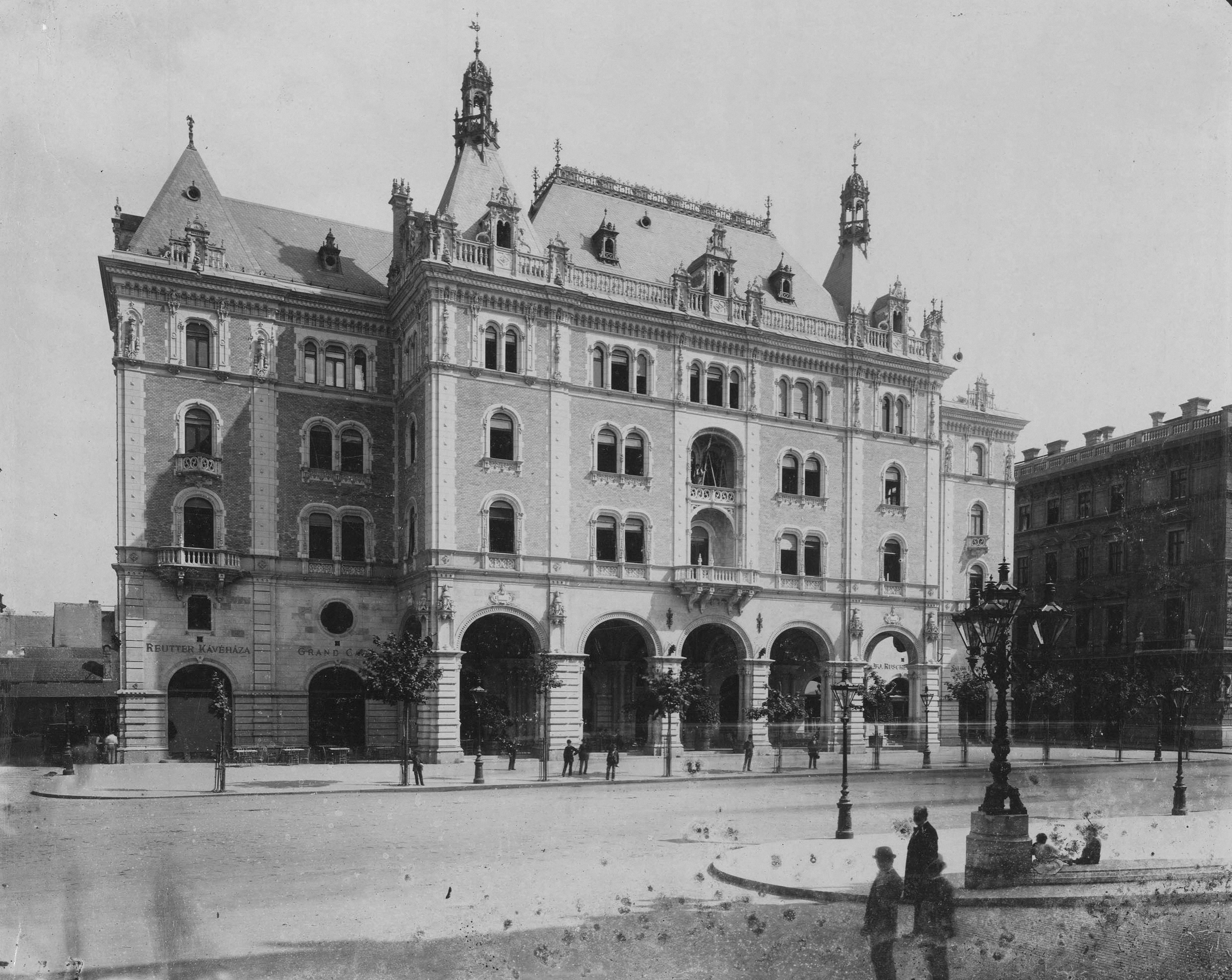 MAGYARORSZÁG BUDAPEST VI. Andrássy (Sugár) út 25., Drechsler-palota. A felvétel 1884-1890 között készült. A kép forrását kérjük így adja meg: Fortepan / Budapest Főváros Levéltára. Levéltári jelzet: HU.BFL.XV.19.d.1.06.053